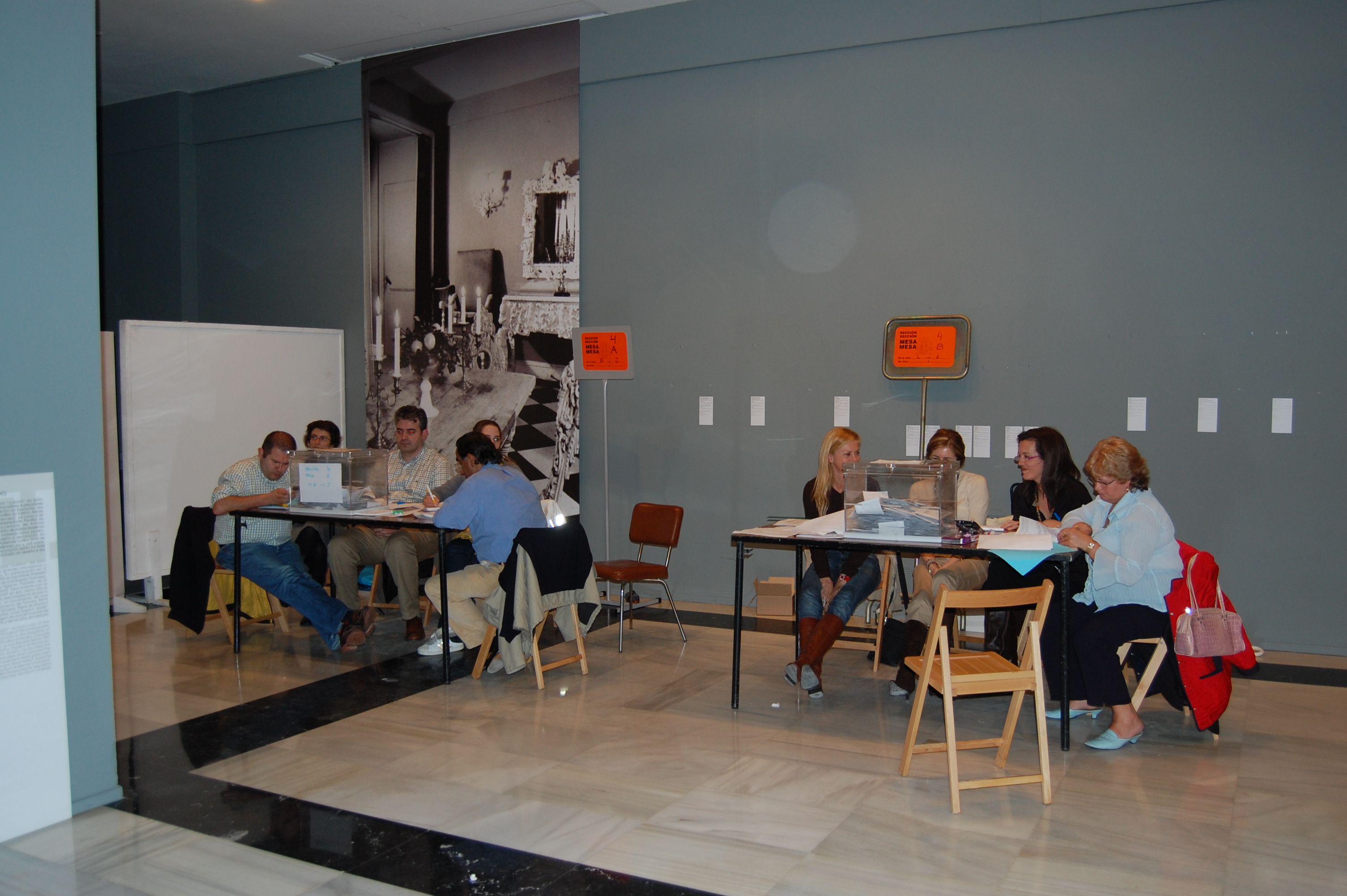 Eleições municipais em Vigo, Galiza.